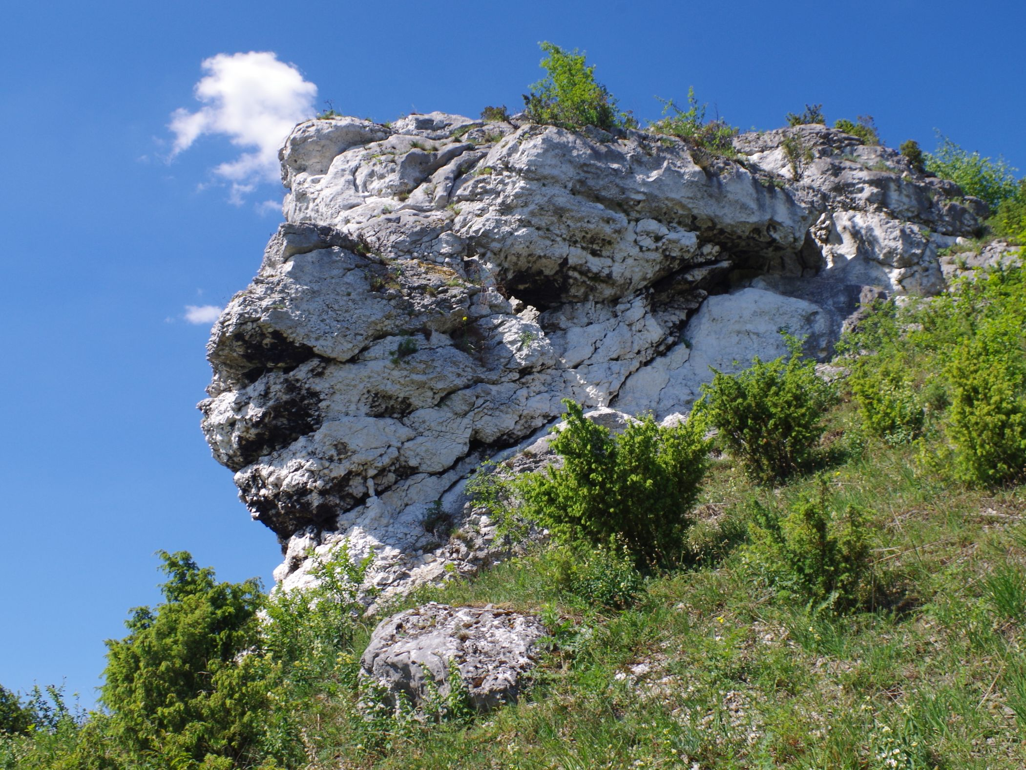 Skała Z Jałowcem na wzgórzu Biakło